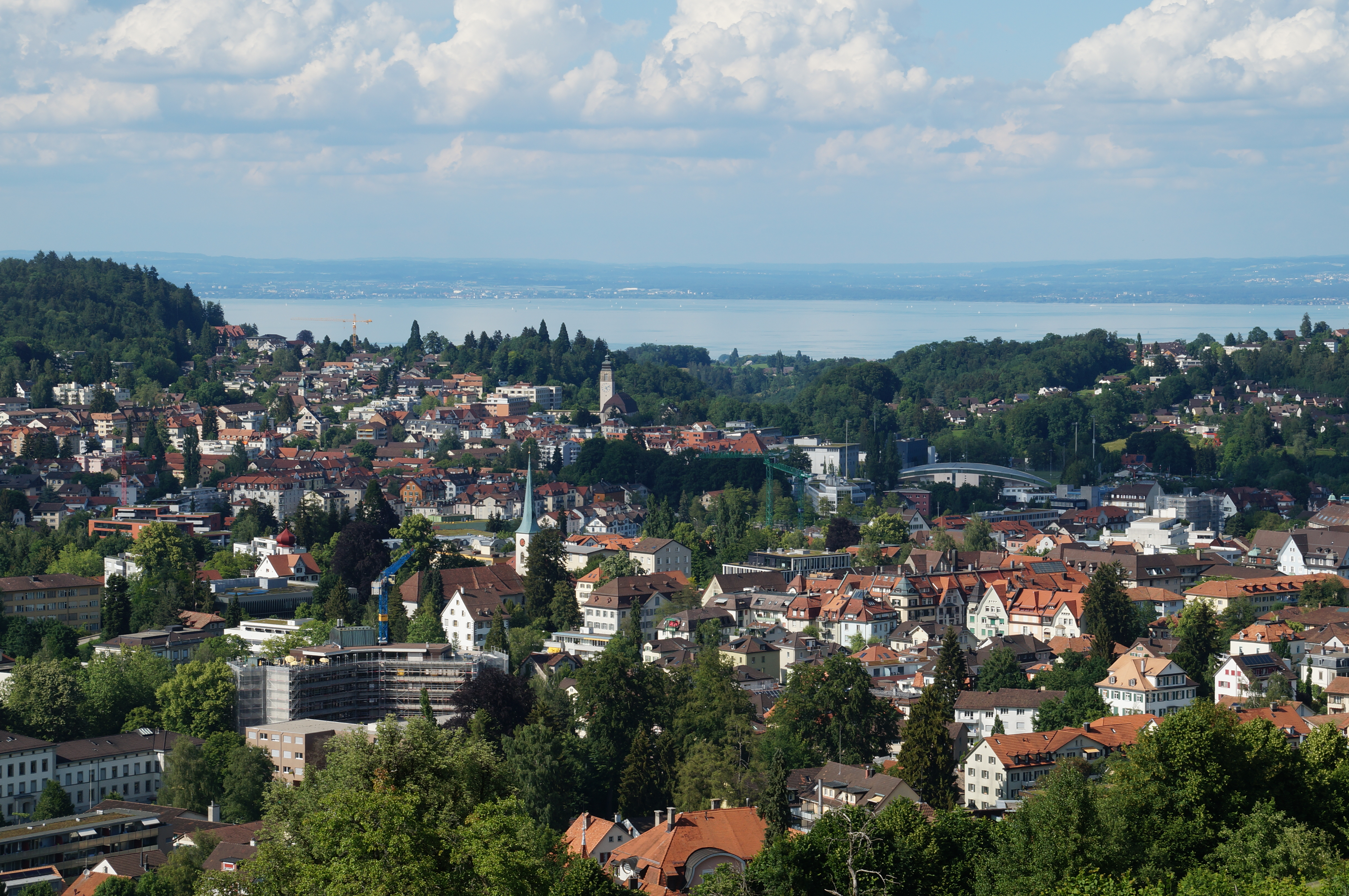 St. Gallen and Lake Constance seen from Drei Weieren